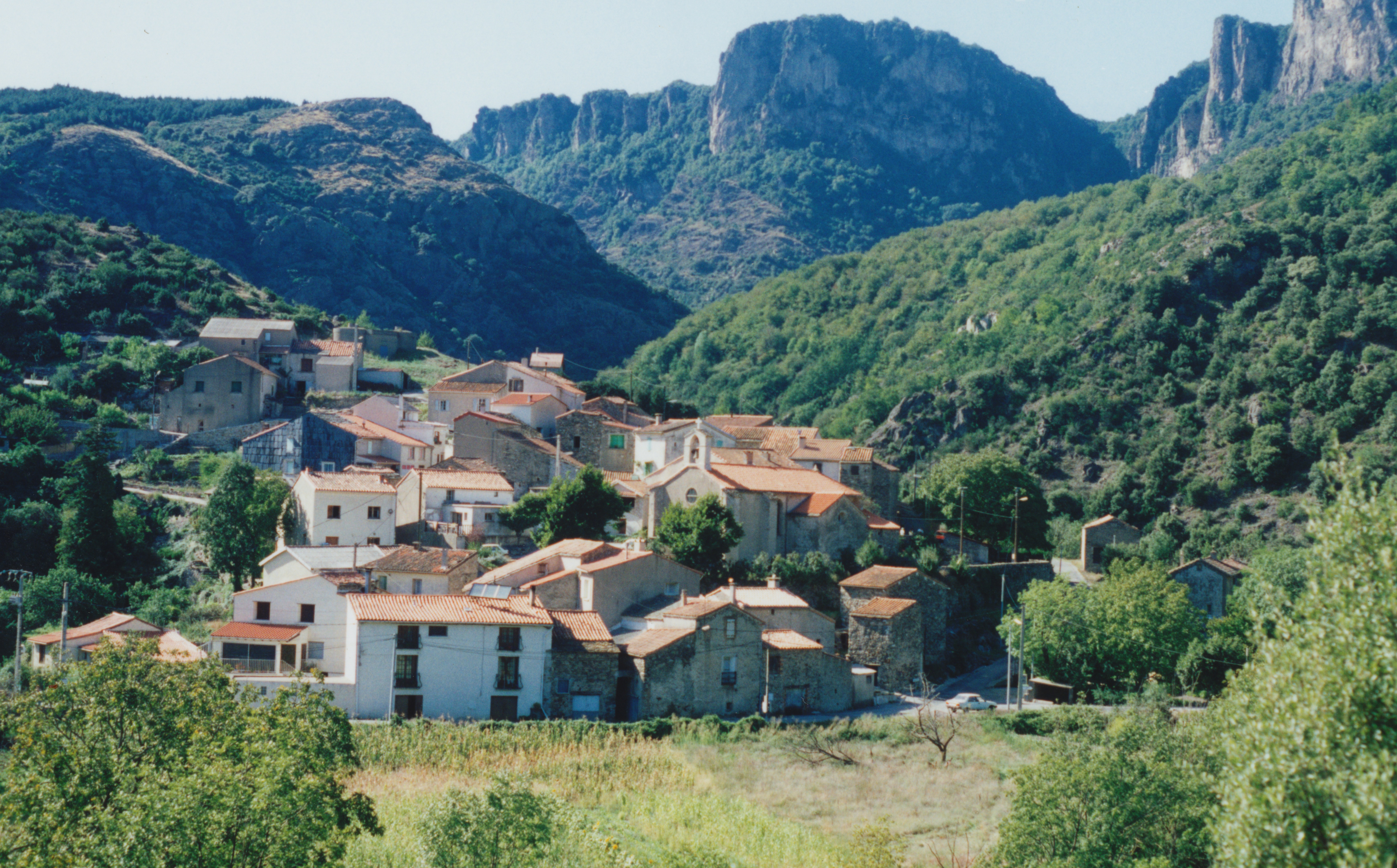 Saint-Geniès-de-Varensal (Hérault) - vue générale sur le village et les falaises d'Olques.